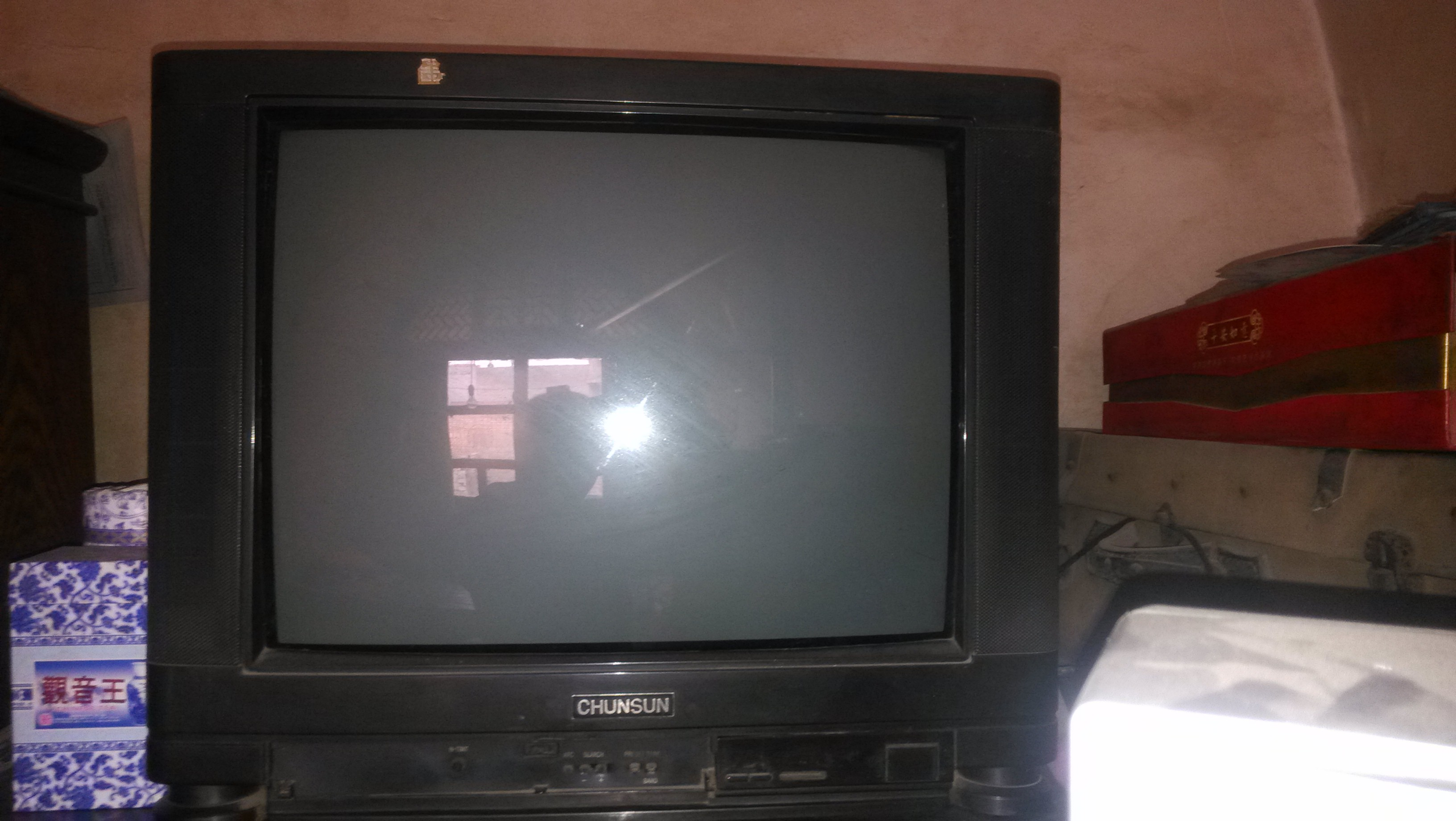 春笋牌某型号彩色直角电视机。摄于山西省晋中市平遥县段村镇七洞村某农家。